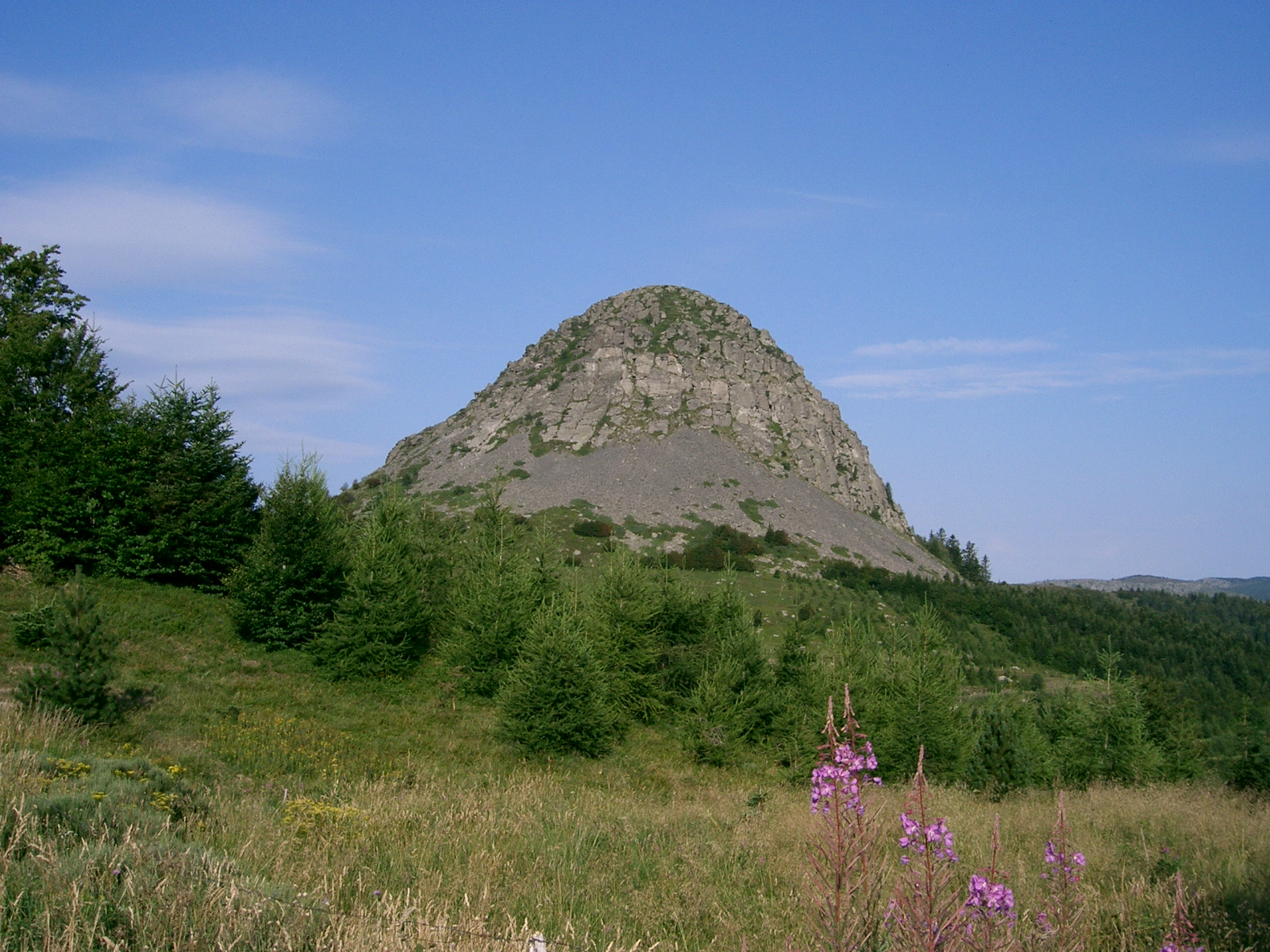 Mont Gerbier de Jonc (en venant de St Martial au nord-est)